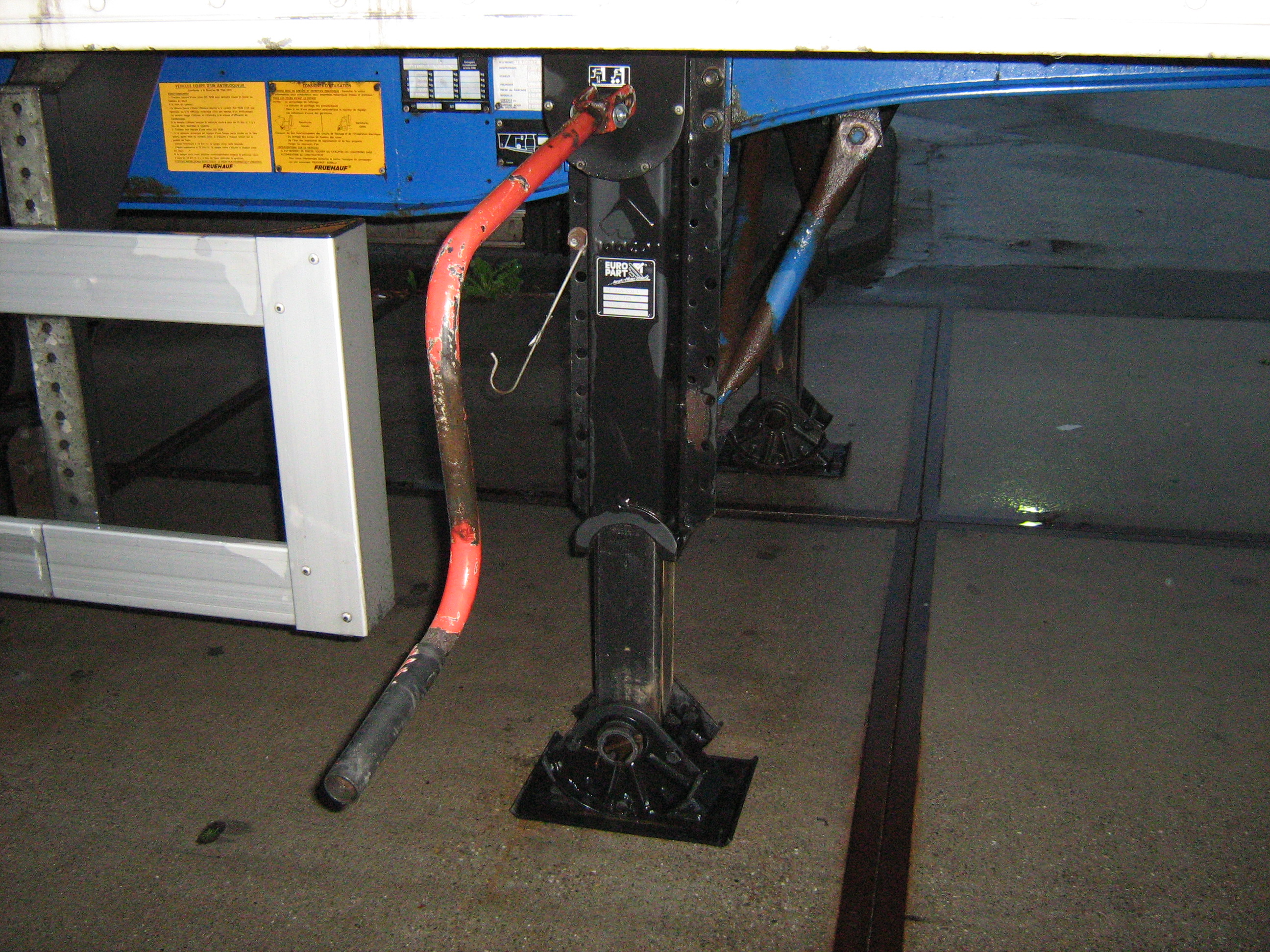 Auflieger-Stütze mit Kurbel